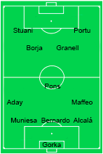 1a alineacion del Girona FC en 1a División